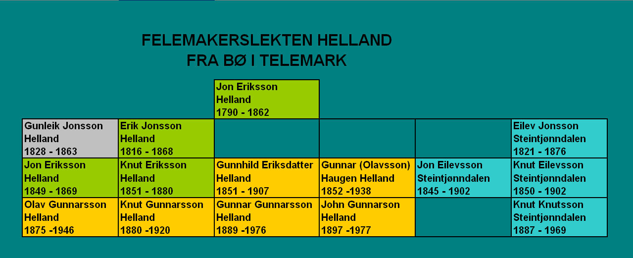 Slekstavle, Felemakerslekten Helland.